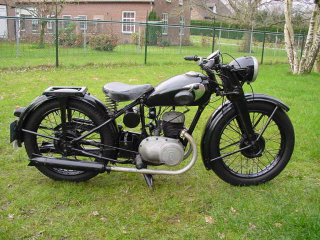 Zundapp 1940 DB 200.